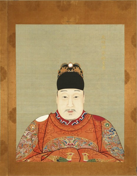 中文（中国大陆）: 作者已经去世超过200年，作品已经进入公有领域。